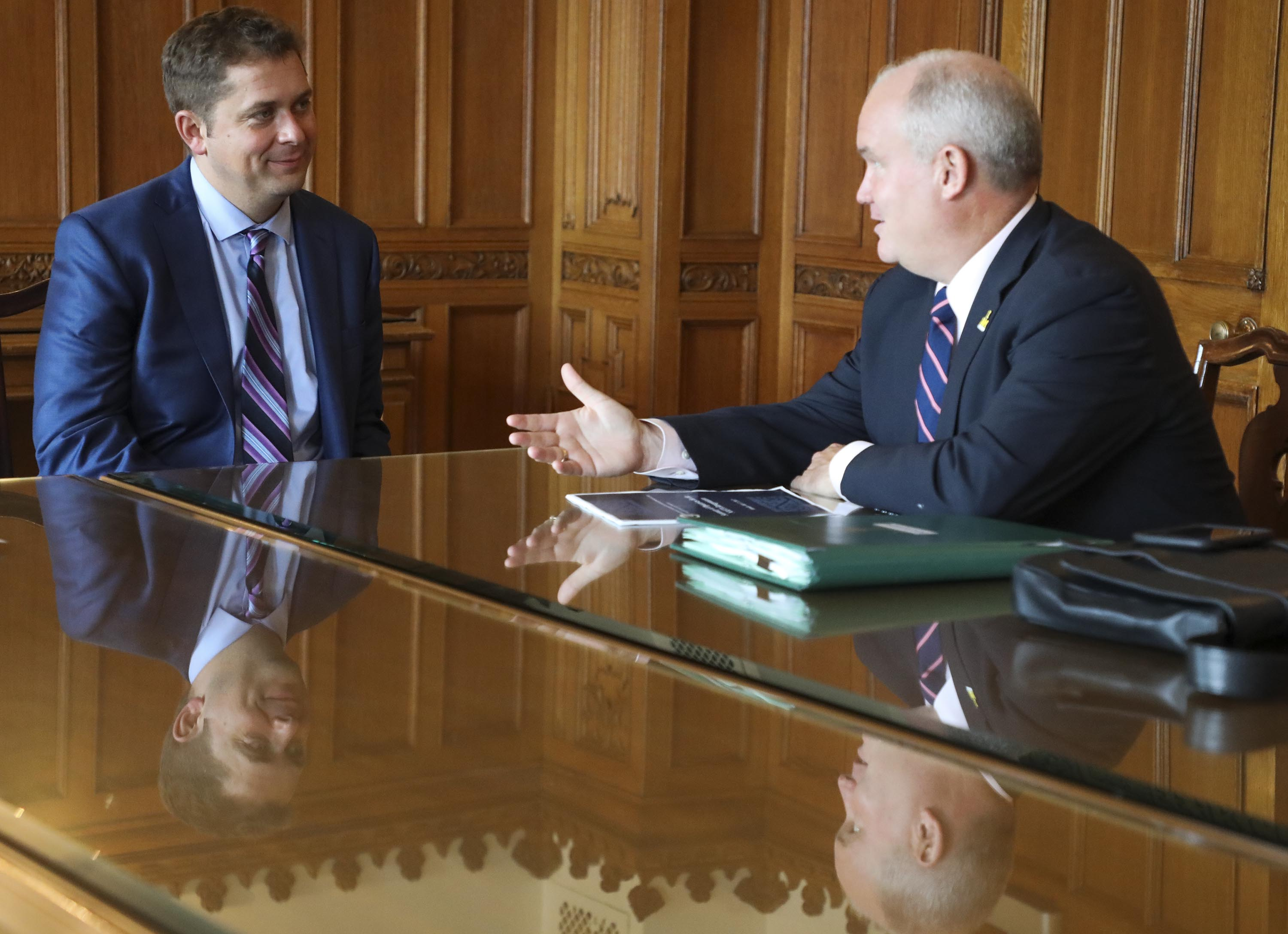 Talking with Erin O'Toole about the ongoing NAFTA negotiations and how Canada's Conservatives will stand up for Canadian workers. J'ai parlé avec Erin O'Toole des négociations sur l’ALENA et de la façon dont les conservateurs du Canada défendent les travailleurs canadiens.